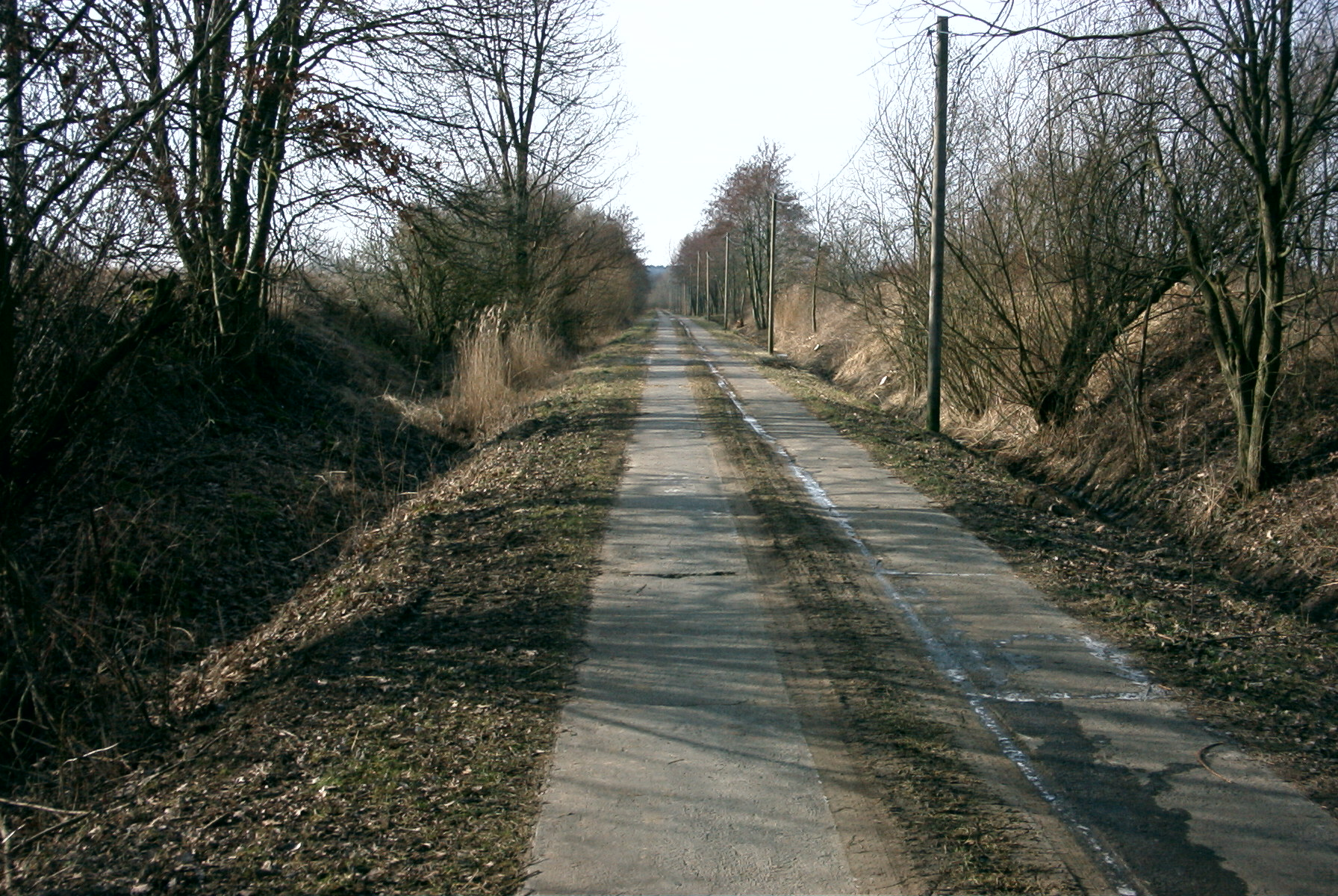 Kleinbahnstrecke zur Peene bei Neuendorf